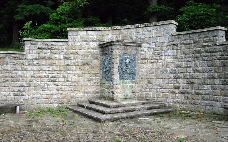 Weserliedanlage in der Stadt Hann. Münden